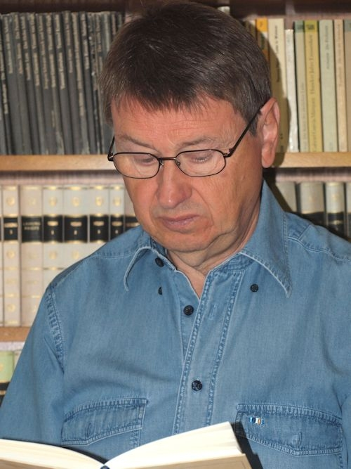 Aufgenommen von Maria Buschmann.